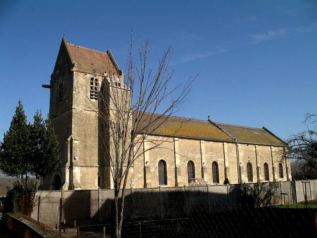 Église Notre-Dame-de-la-Nativité à Sannerville (Calvados)